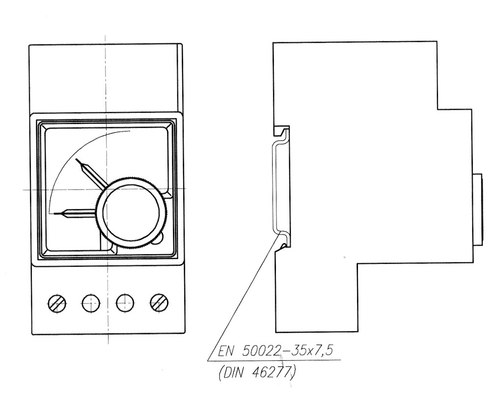 Sínre szerelhető ikerfémes műszer